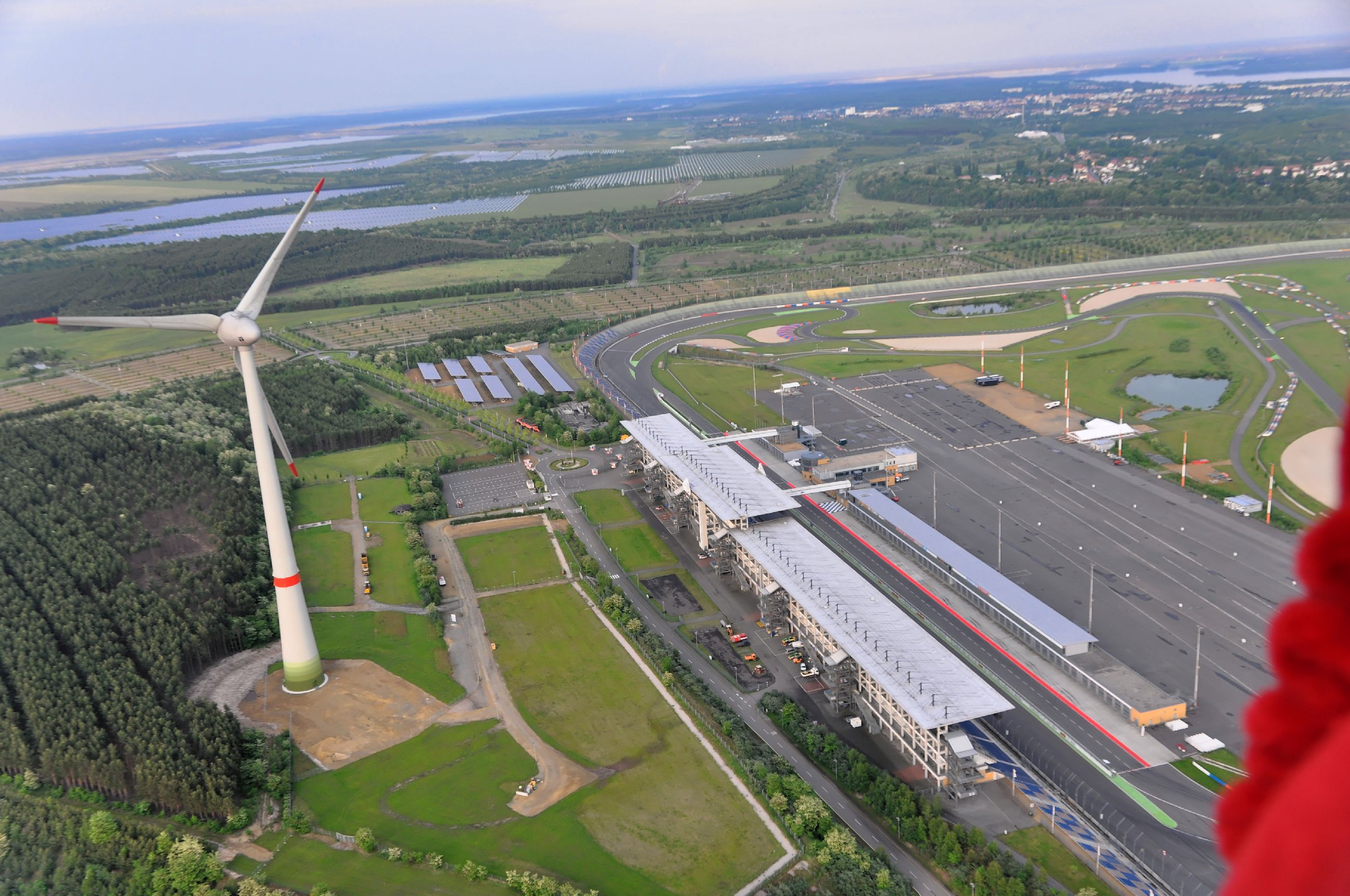 Bilder von den Lausitz Luftsport- & Techniktage 2013 am Flugplatz Schwarzheide-Schipkau